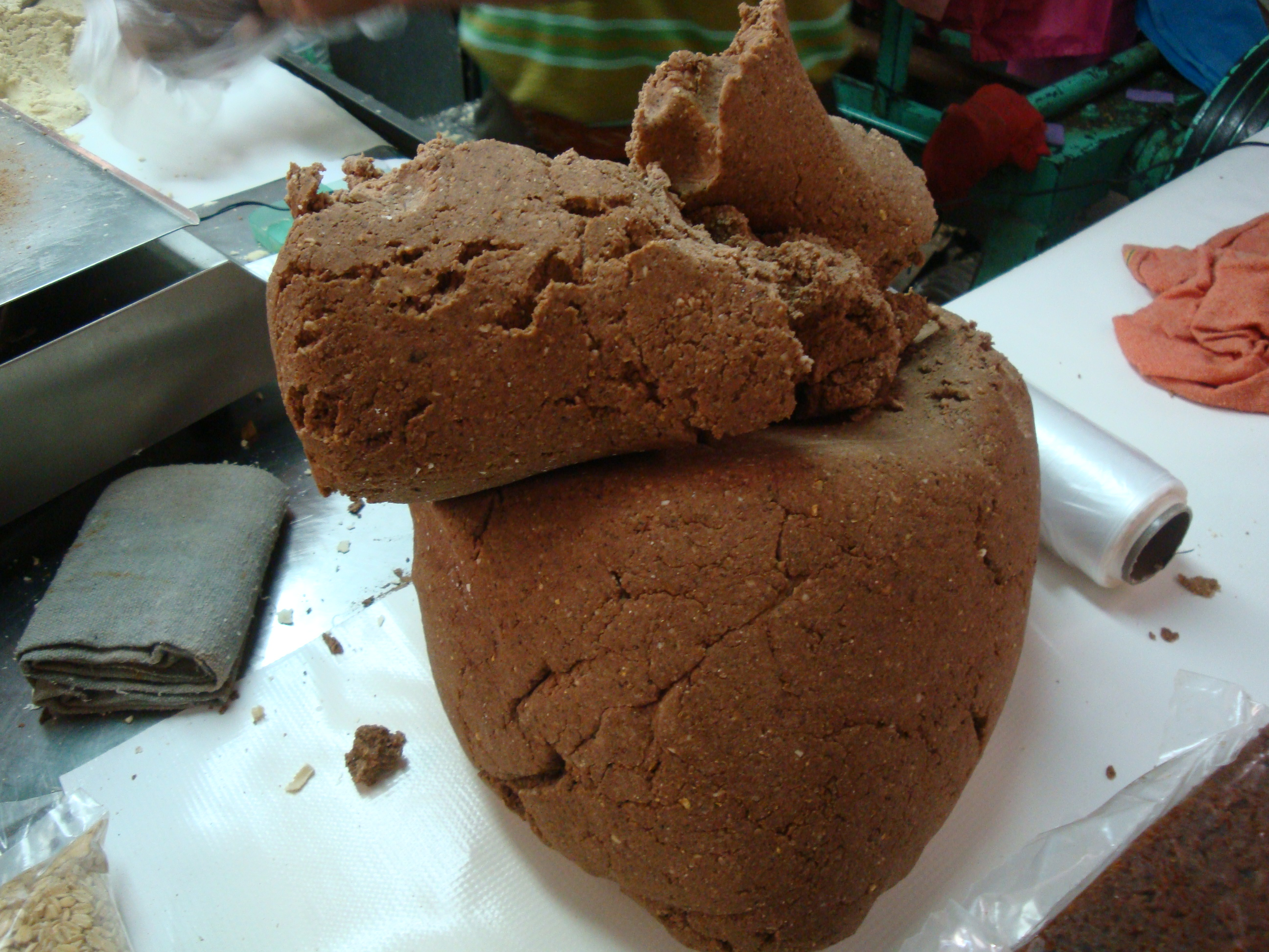 "Bola" de Pozol (bebida a base de cacao y maíz, originaria del estado de Tabasco) lista para su venta en un mercado de la ciudad de Villahermosa, estado de Tabasco, México.